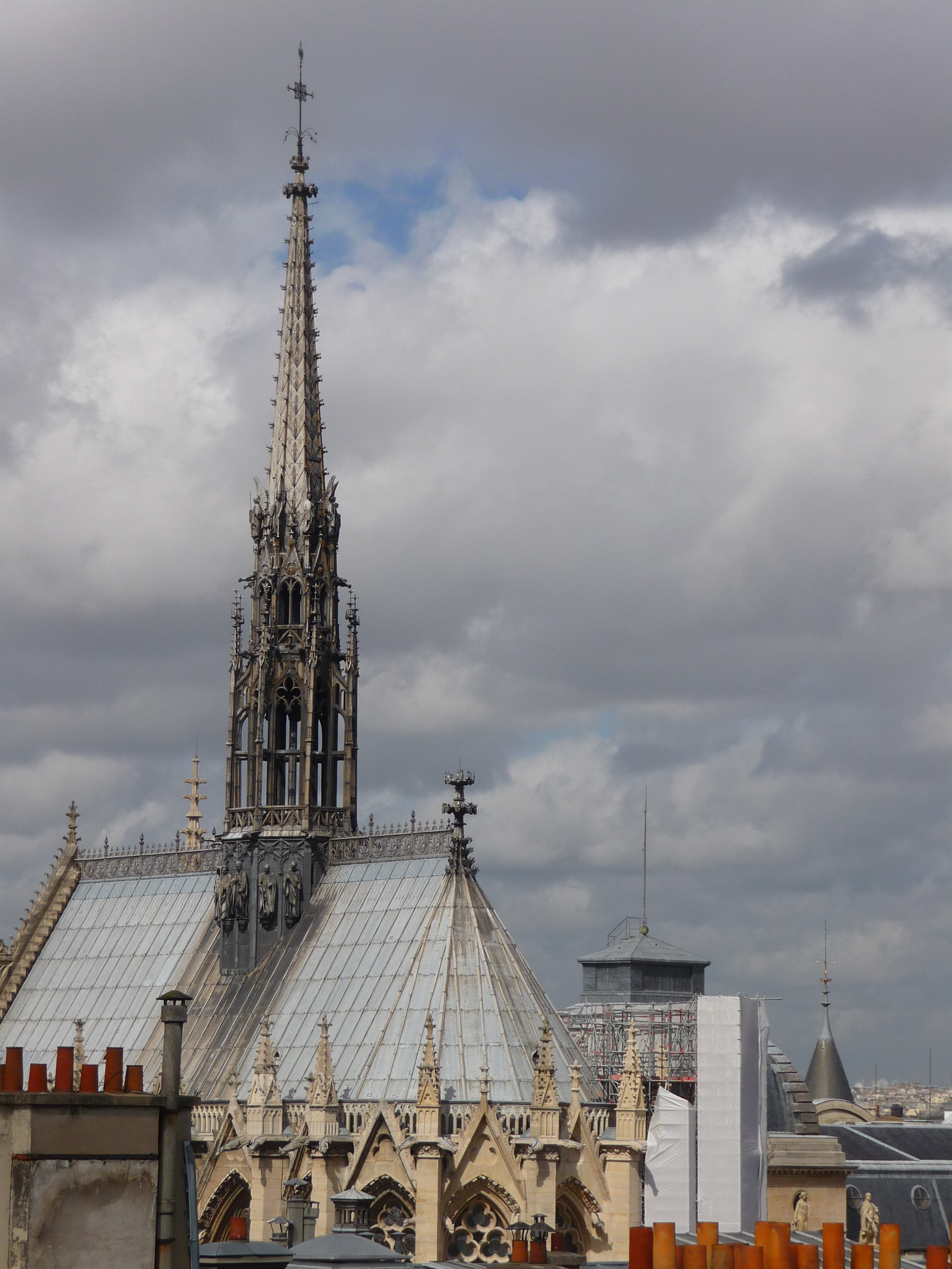 Sainte-Chapelle (Classé) Vue de la préfecture de police de Paris .